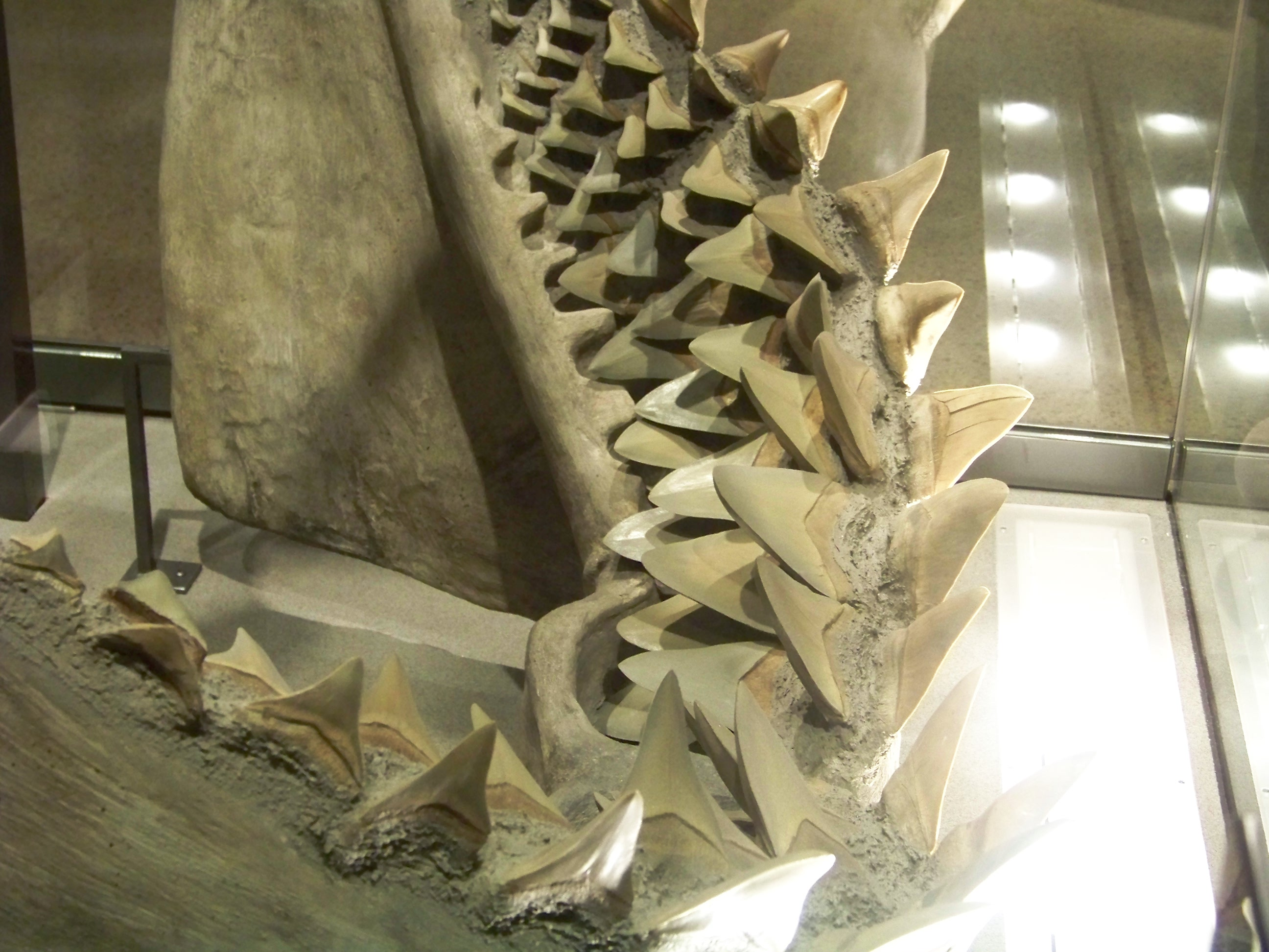 megalodon jaw